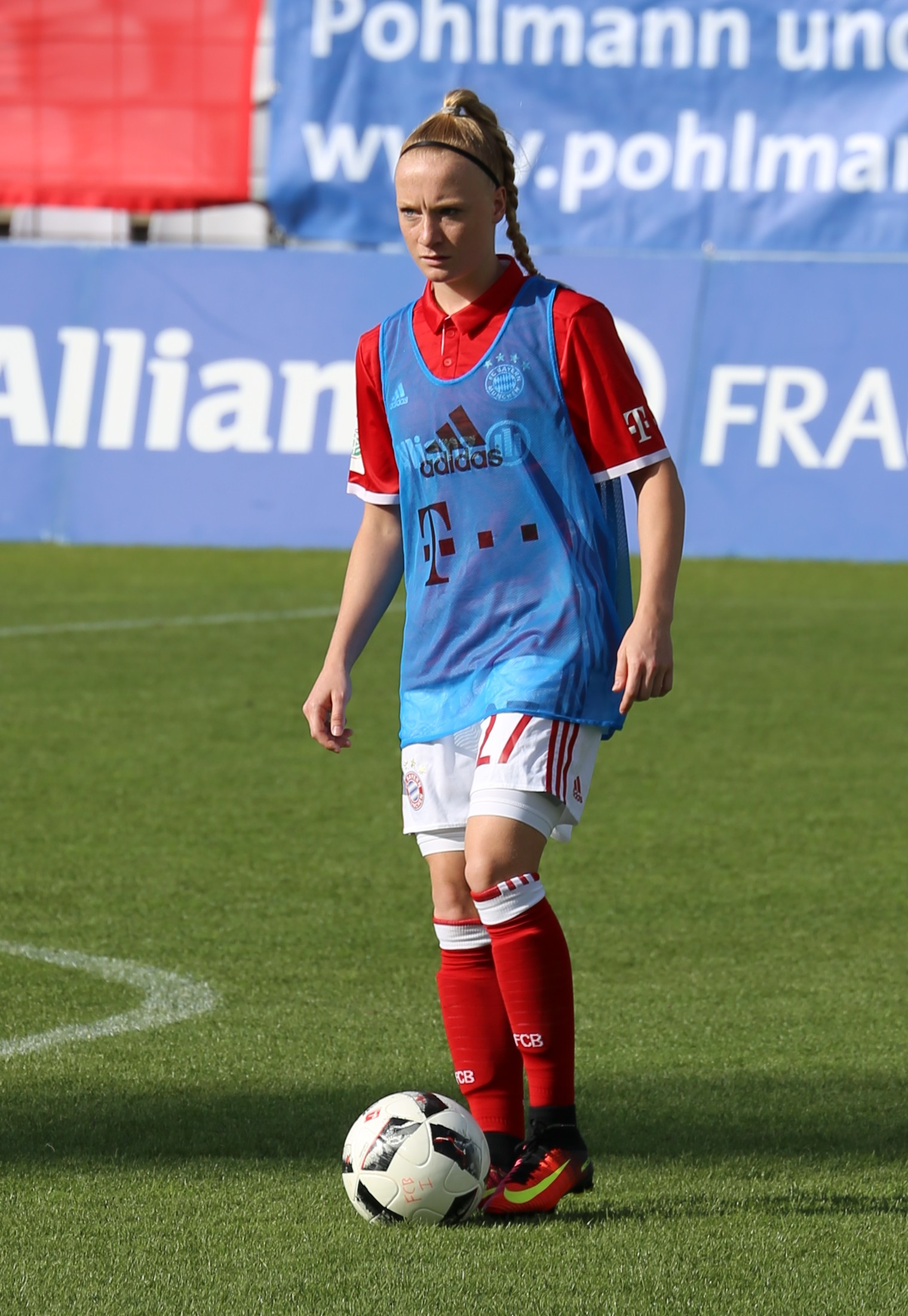 Anna Gerhardt, FC Bayern München, beim Aufwärmen vor dem Frauen-Bundesliga-Spiel FC Bayern München gegen SC Freiburg am 3. September 2016 im Stadion an der Grünwalder Straße (Ergebnis war 1:1).